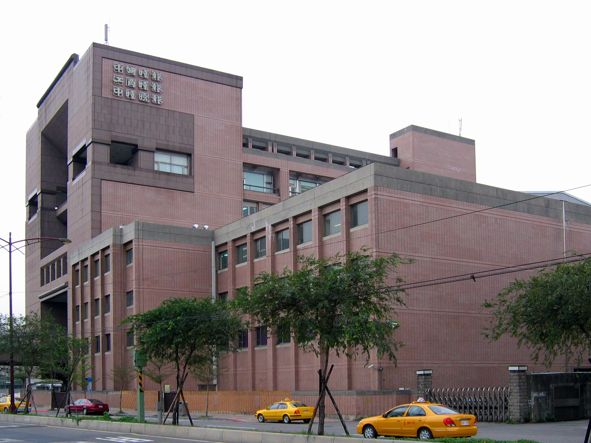 中文（台灣）: 時報大樓，位於臺北市萬華區艋舺大道303號。